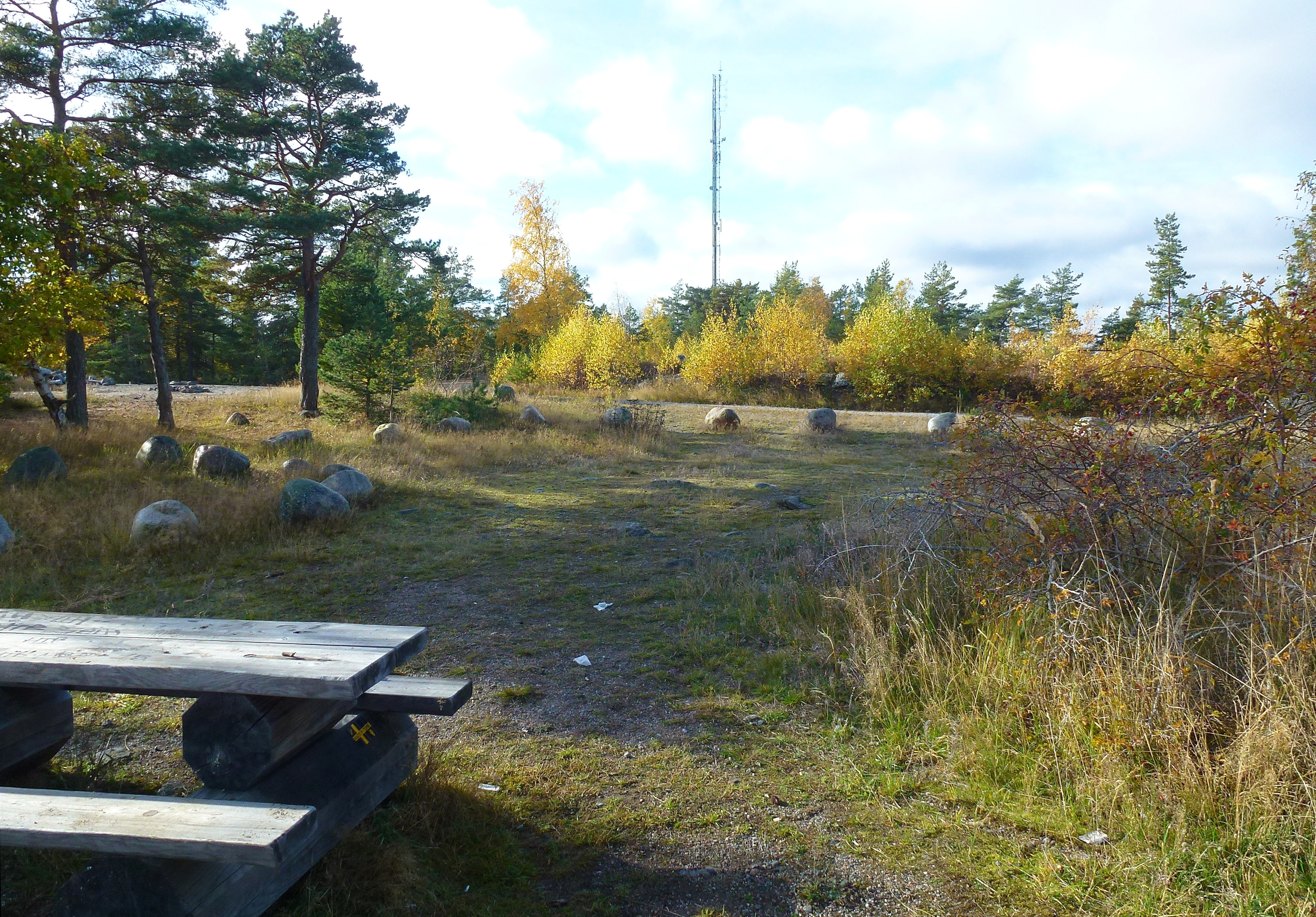 Galtberget (även kallat Telegrafberget) i Älta, Nacka kommun